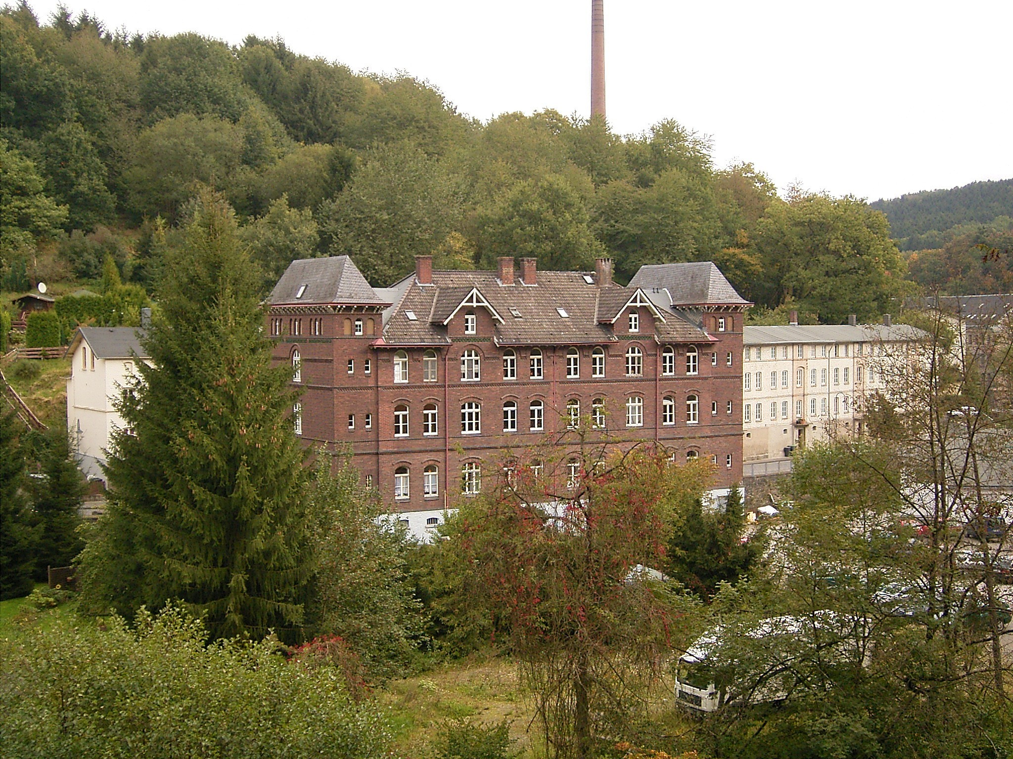 Radevormwald